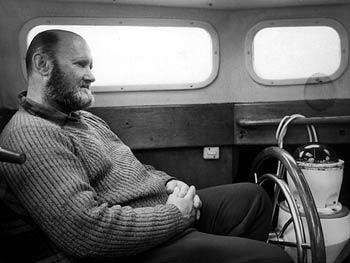 Kapitan Henryk Jaskuła Zdjęcie pochodzi z prywatnego archiwum Henryka Jaskuły Zdjęcie zostało udostępnione przez magazyn wodniaków Port21.pl